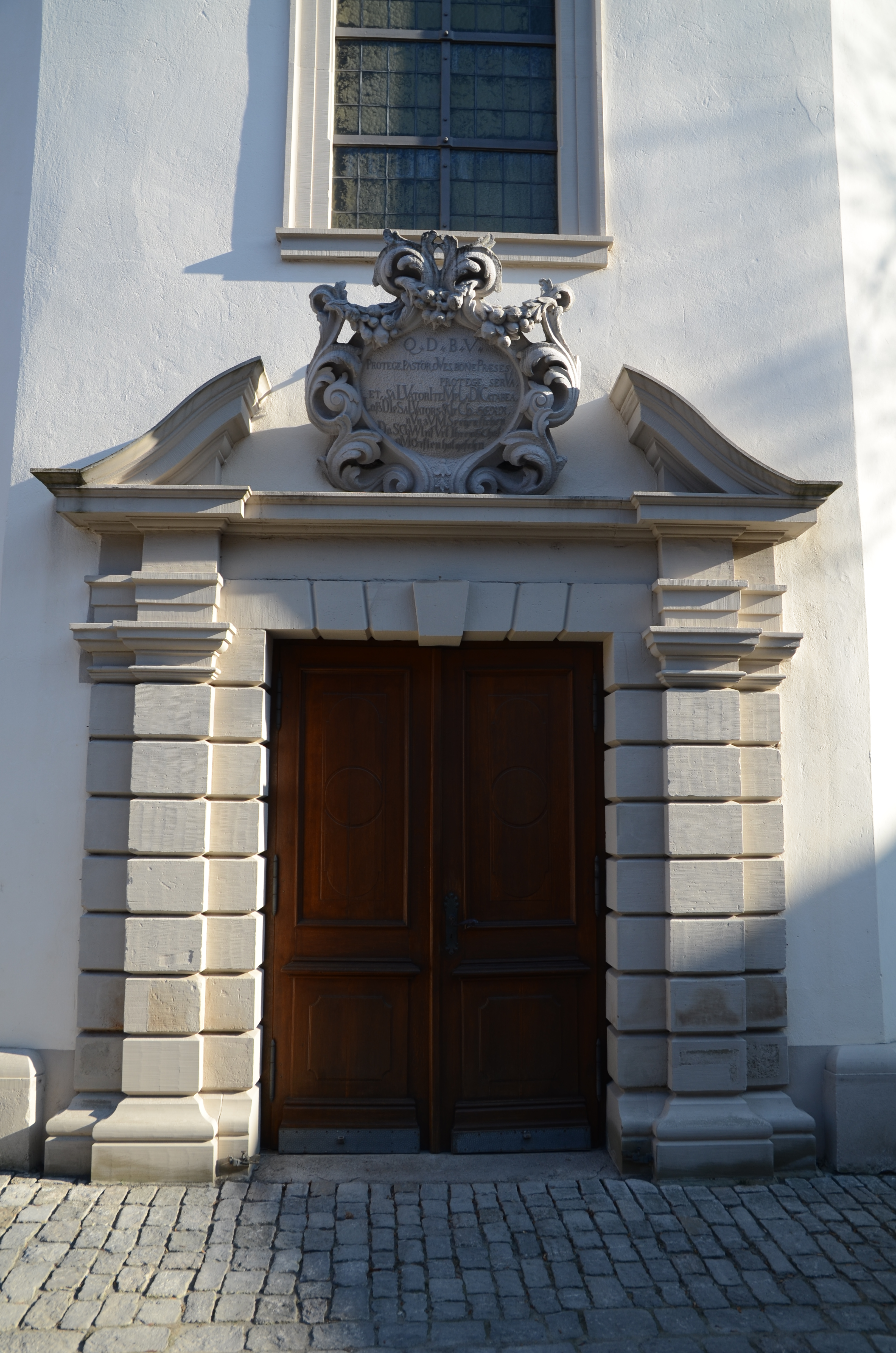 St. Salvatorkirche in Schweinfurt Eingangsportal